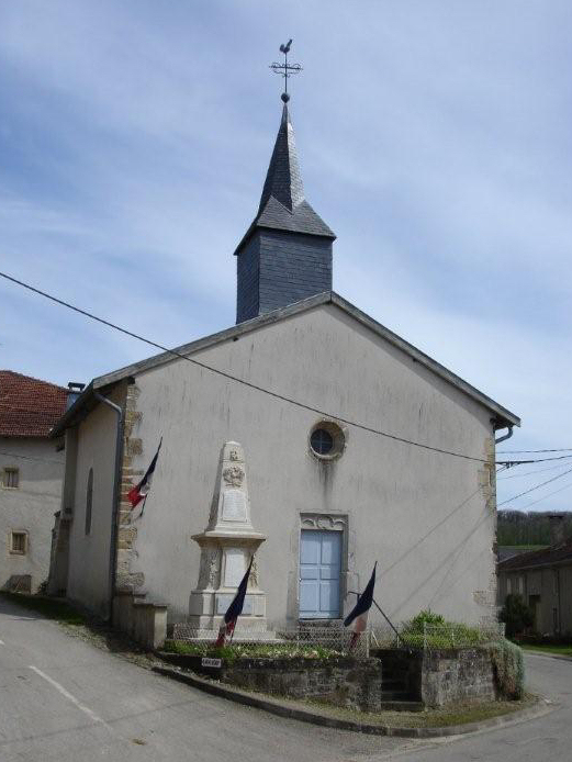 L'église de Belmont-sur-Vair, petite commune du département des Vosges.